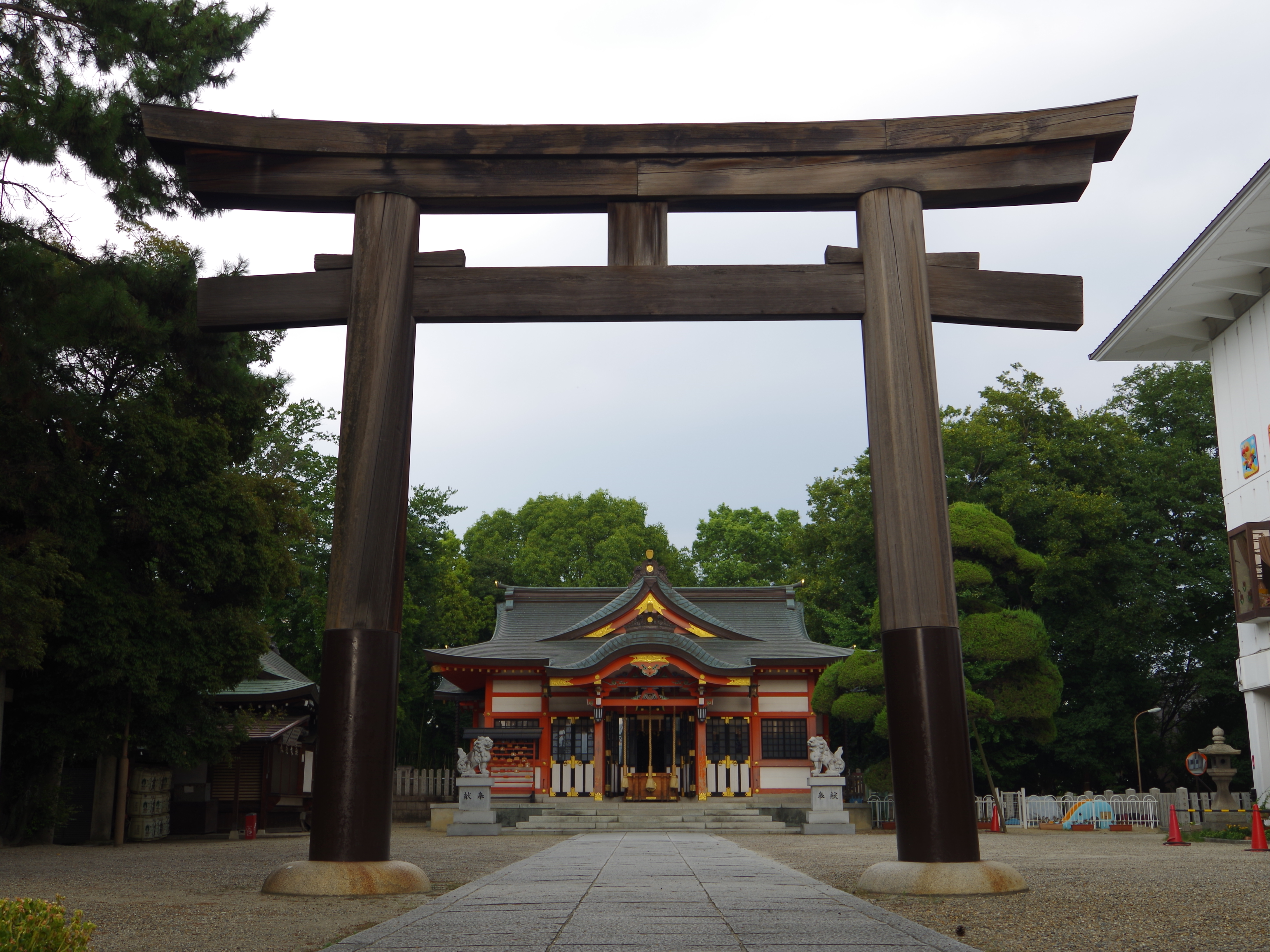 石園坐多久虫玉神社 大和高田市片塩町 Isono-ni-masu-takumushitama-jinja 2013.8.16